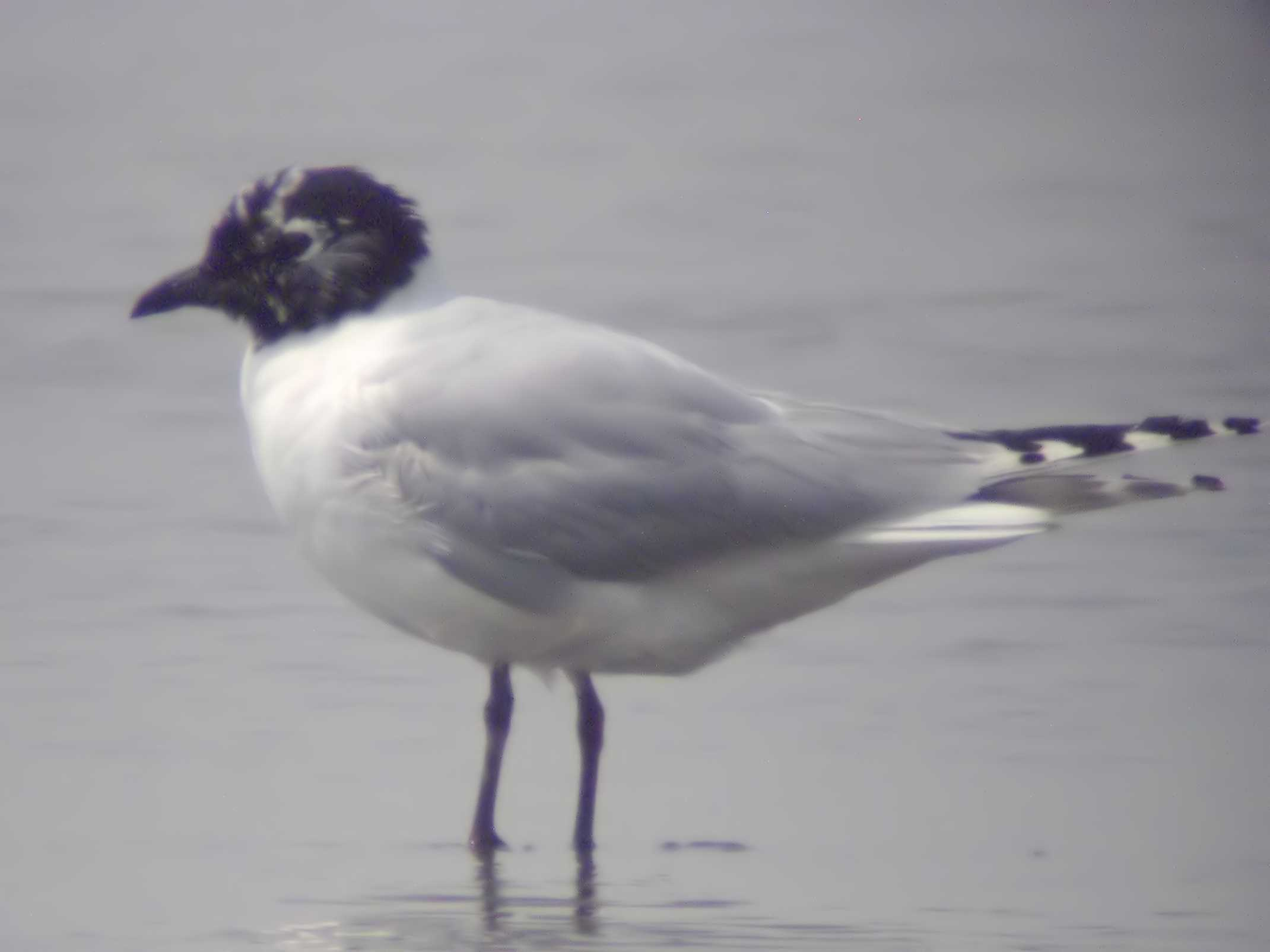 Saunders's Gull Chroicocephalus saundersi, Mai Po, Hong Kong.